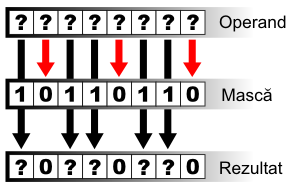 Exemplificare grafică a mascării binare